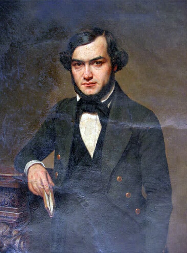 Portrait de Pierre Pélissier à l'âge de vingt-sept ans.